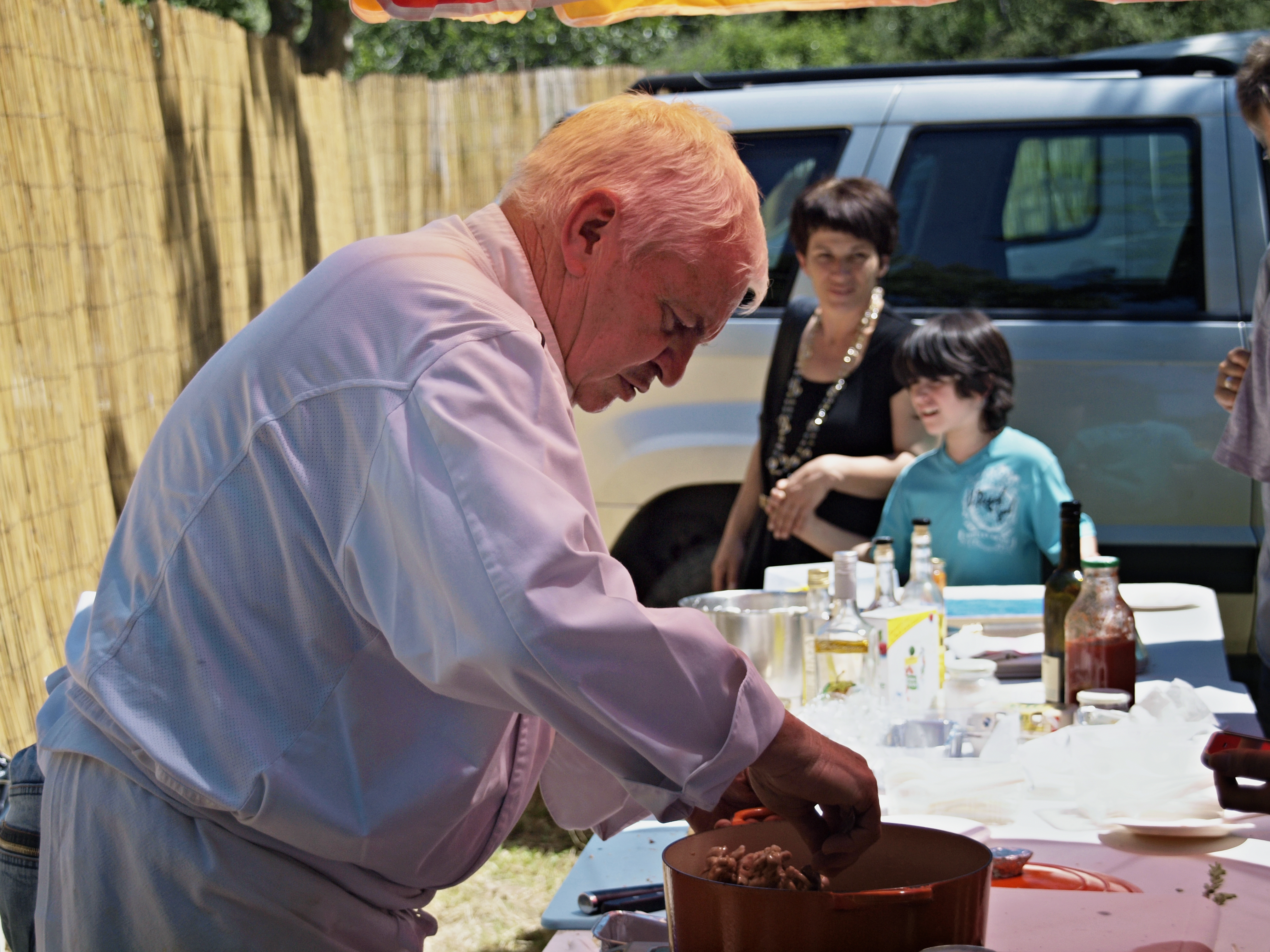 Calenzana (Corsica) - Vincent Tabarani chef cuisinier de Cucina Corsa en démonstration à la foire de Sainte-Restitude 2010